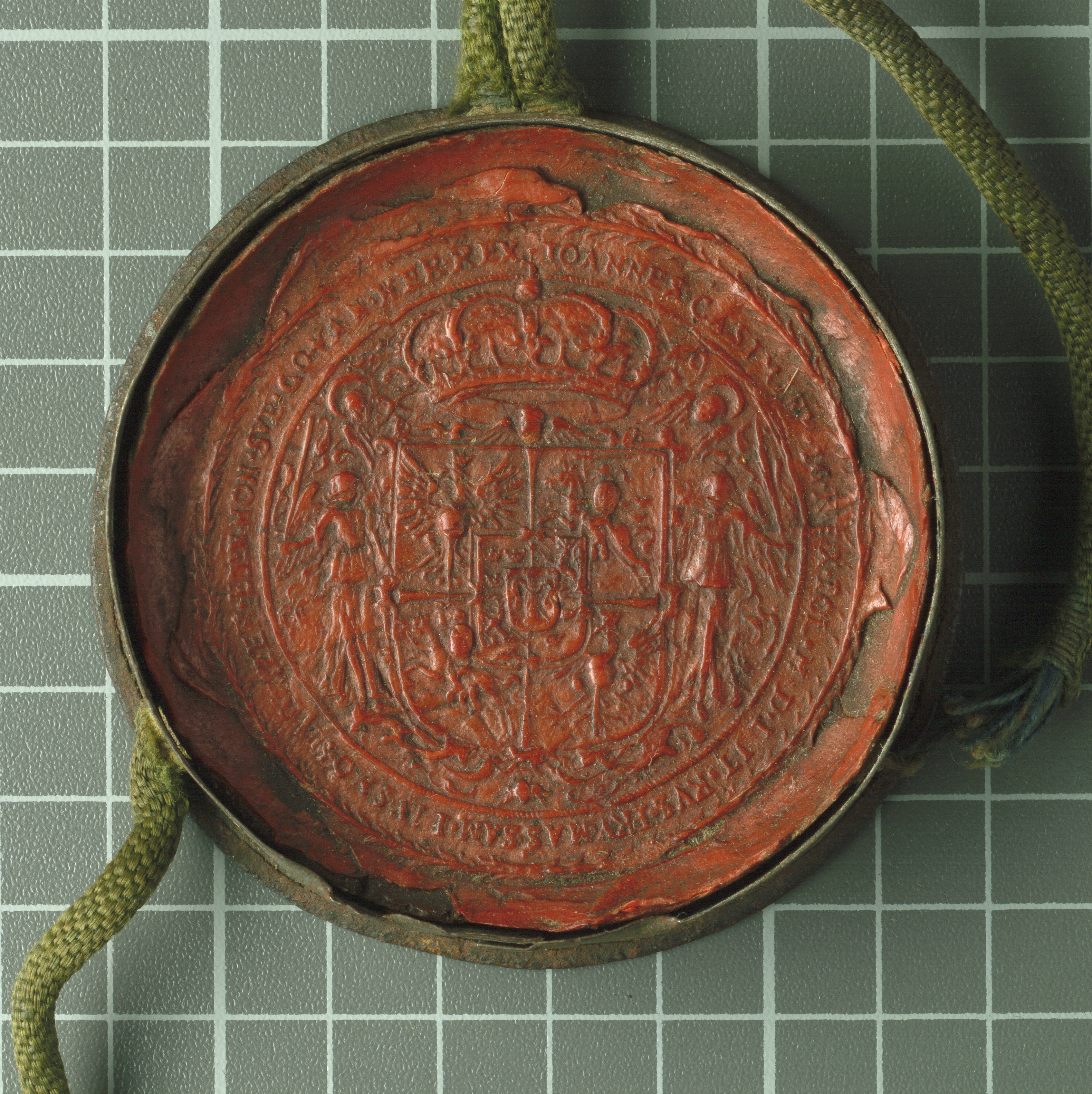 Pieczęć mniejsza koronna, o średnicy 62 mm., wyobraża tarczę 9 polową polsko-szwedzką z herbem Wazów w środku, ozdobioną ornamentami barokowymi i podtrzymywaną przez dwie postacie aniołków. Nad tarczą korona, koło której trzy główki skrzydlate i rok 16-49. W otoku napis: IOANNES . CASIMIRUS . DG . REX . POL . M . D . LIT . RVS . PRV . MAS . SAM . LIV . SMO . SEVE . CZER . RT . N . NON . SVE . GO . VAN . HER . REX.